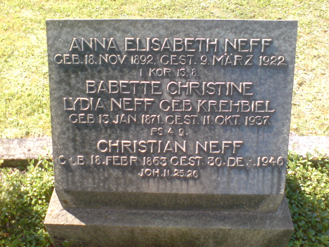 Grabmal von Christian Neff auf dem Mennonitischen Friedhof in Bolanden-Weierhof